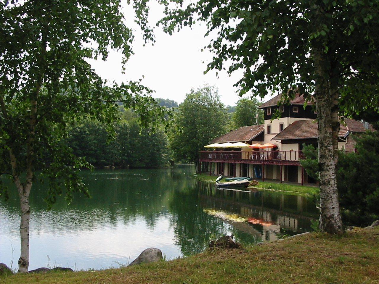 Le lac des Messires, dans le camping d'Herpelmont (Vosges).